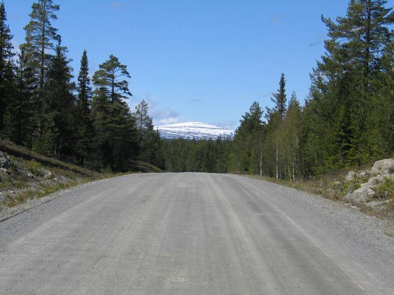 Der Fäbodvägen in Jämtland, Schweden mit Blick auf das Oviksfjäll; the Fäbodvägen in Jämtland, Sweden with view to the Oviksfjäll